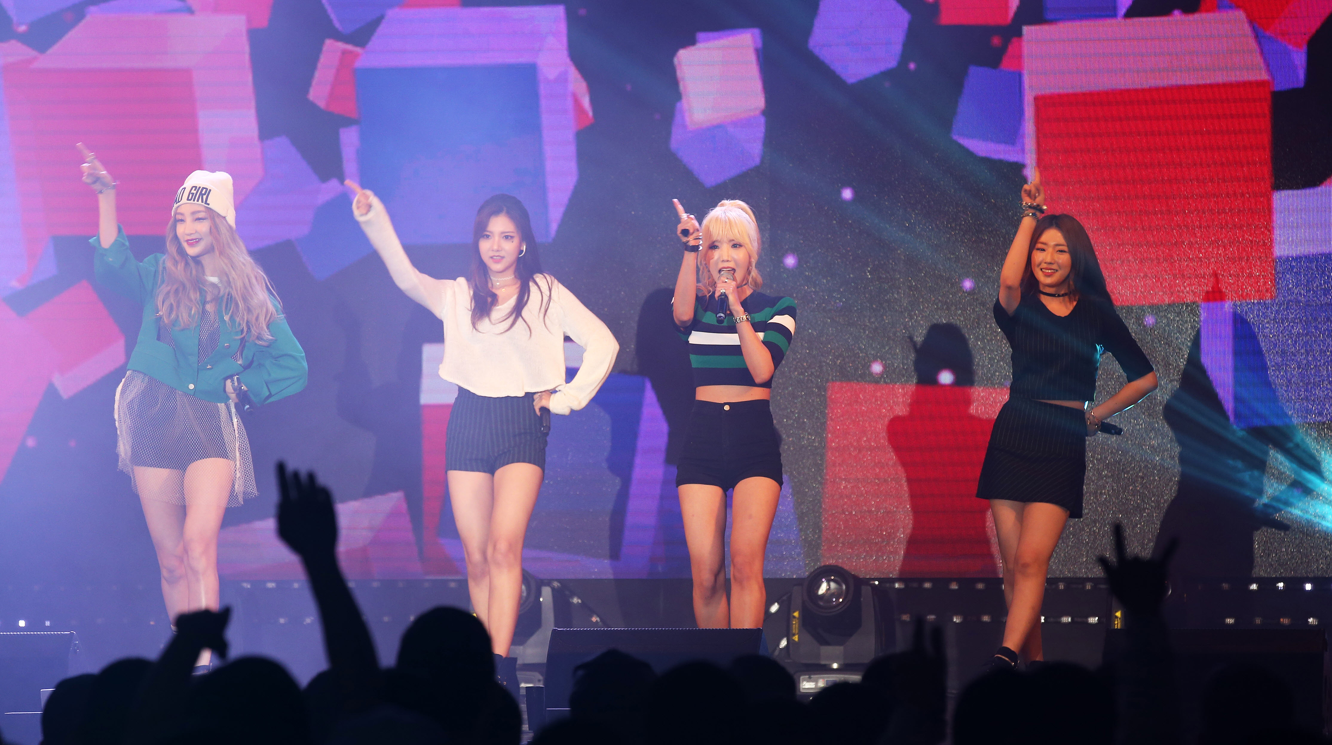 Hello, Mr K! Concert 4TEN April 21, 2016 US Army Garrison-Yongsan Ministry of Culture, Sports and Tourism Korean Culture and Information Service ( Official Photographer : Jeon Han This official Republic of Korea photograph is being made available only for publication by news organizations and/or for personal printing by the subject(s) of the photograph. The photograph may not be manipulated in any way. Also, it may not be used in any type of commercial, advertisement, product or promotion that in any way suggests approval or endorsement from the government of the Republic of Korea. 헬로, 미스터 K! 콘서트 포텐 2016-04-21 주한 미육군 용산기지 문화체육관광부 해외문화홍보원 코리아넷 전한